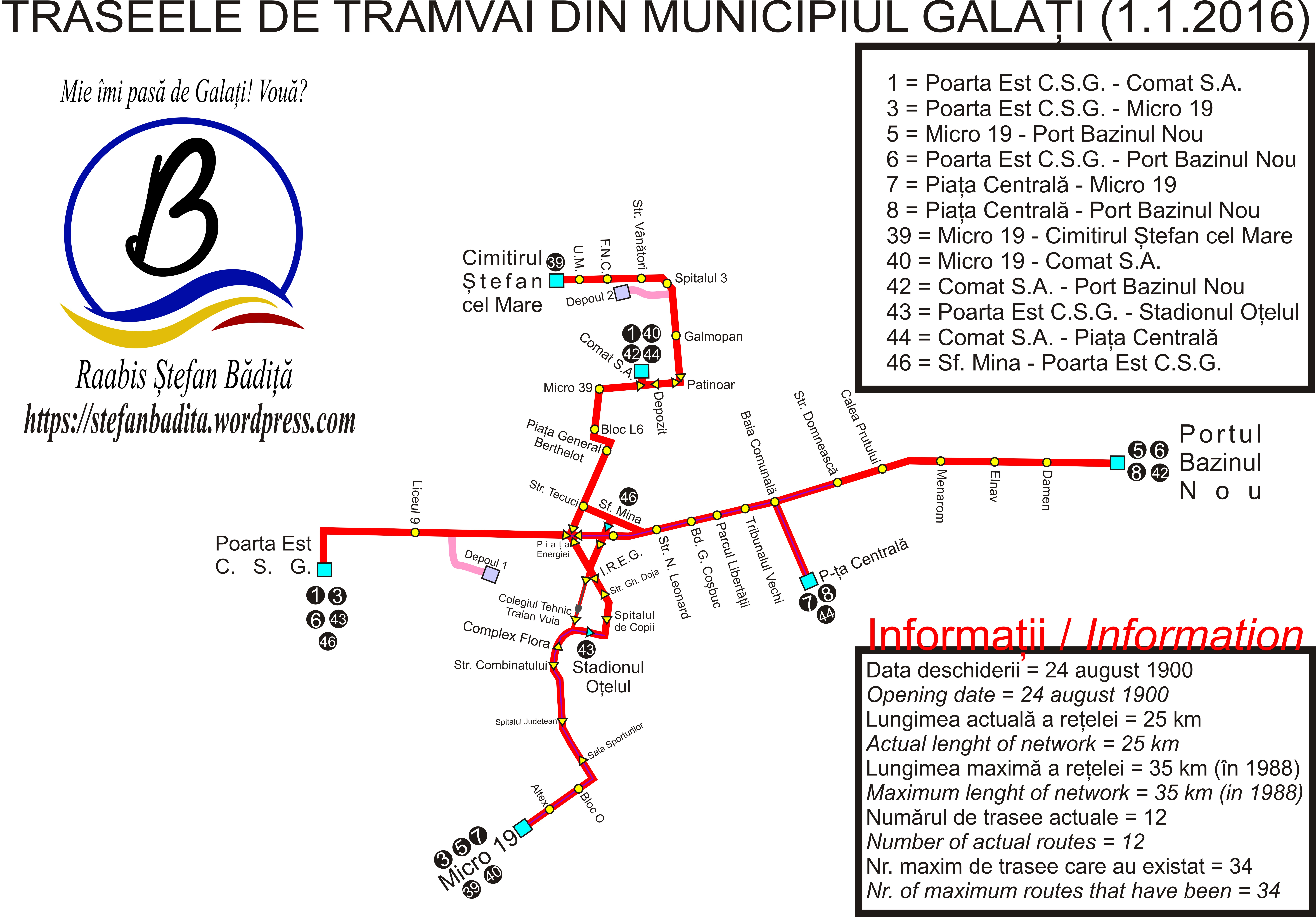 Reteaua de tramvaie din Galati